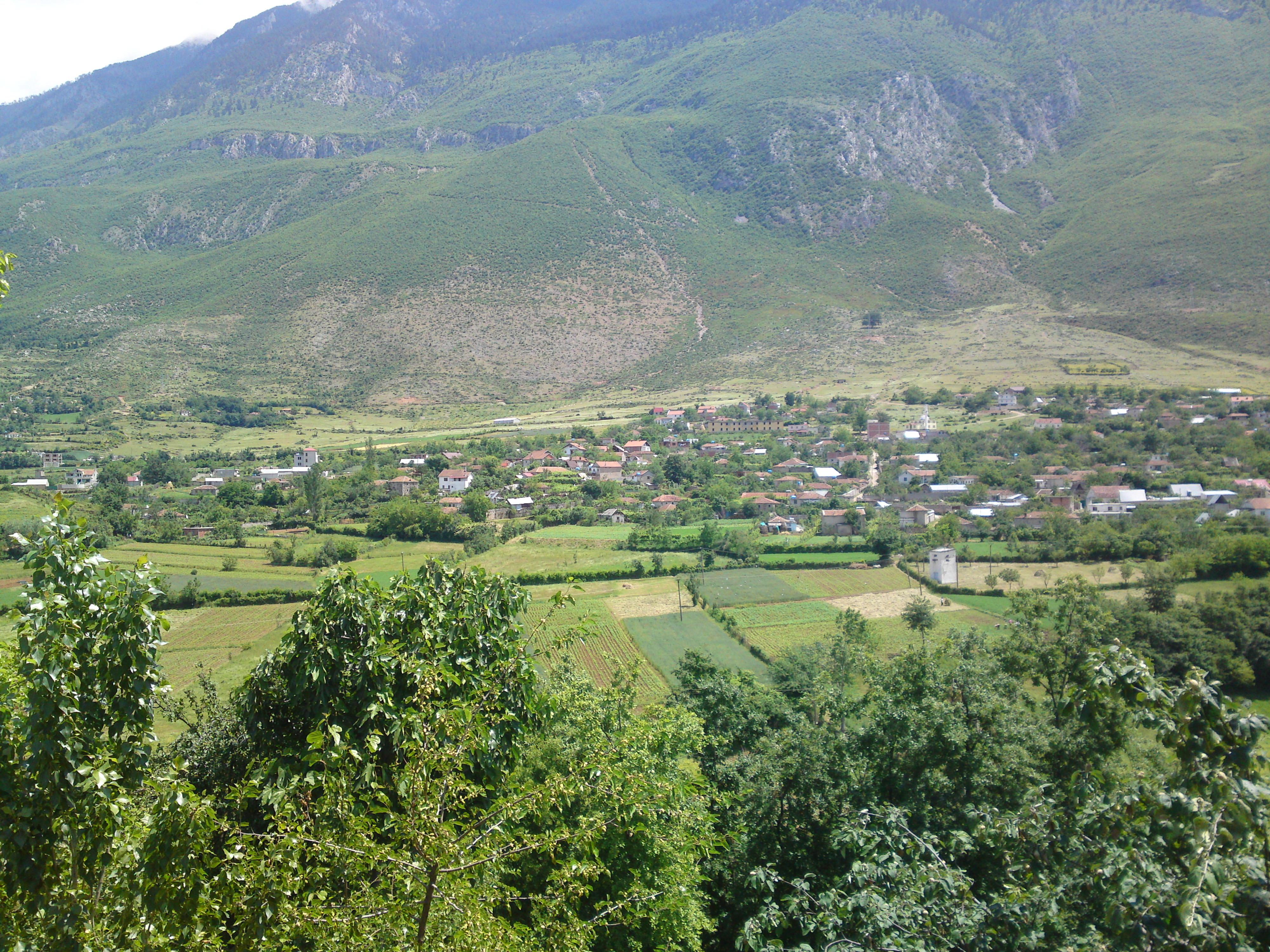 Pamje e malit te Gjalices nga fshati i Bushatit